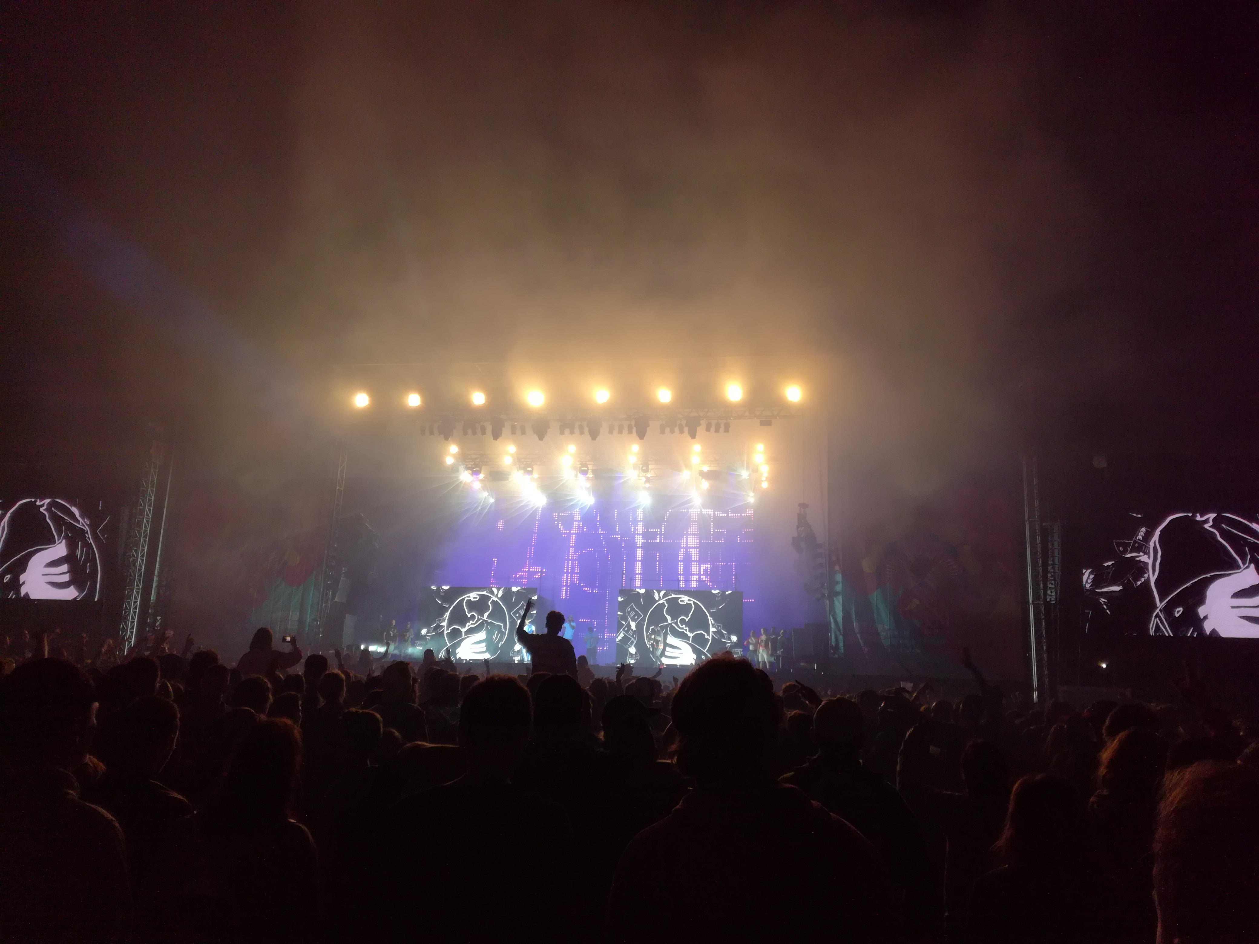 Le groupe de rap PNL en concert au festival des Vieilles Charrues à Carhaix (Finistère, Bretagne) le 14 juillet 2017.